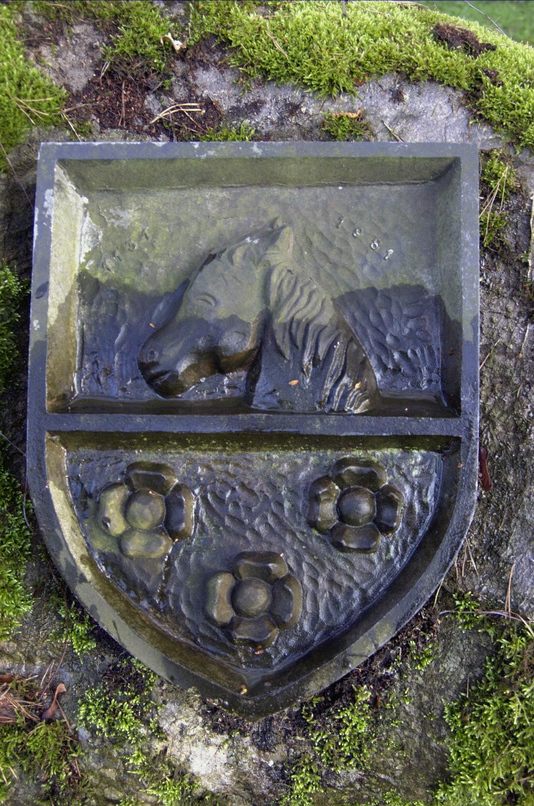 Das Wappen wurde anläßlich des 850jährigen Bestehens vom örtlichen Verschönerungsverein im Zentrum des Ortes angebracht.